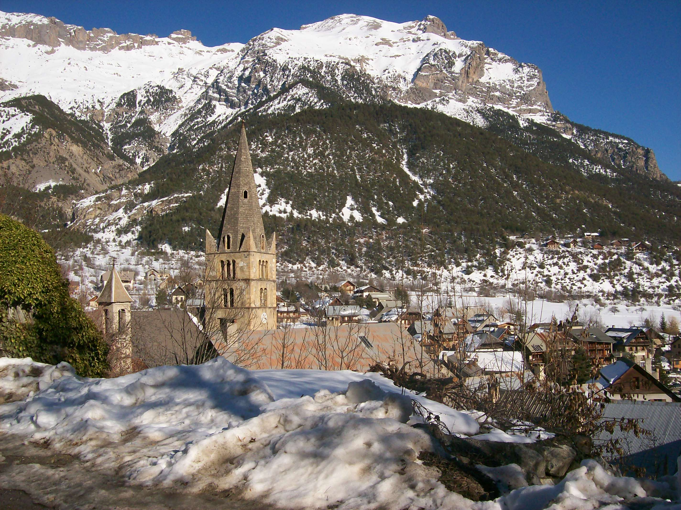 vue générale de Vallouise en hiver